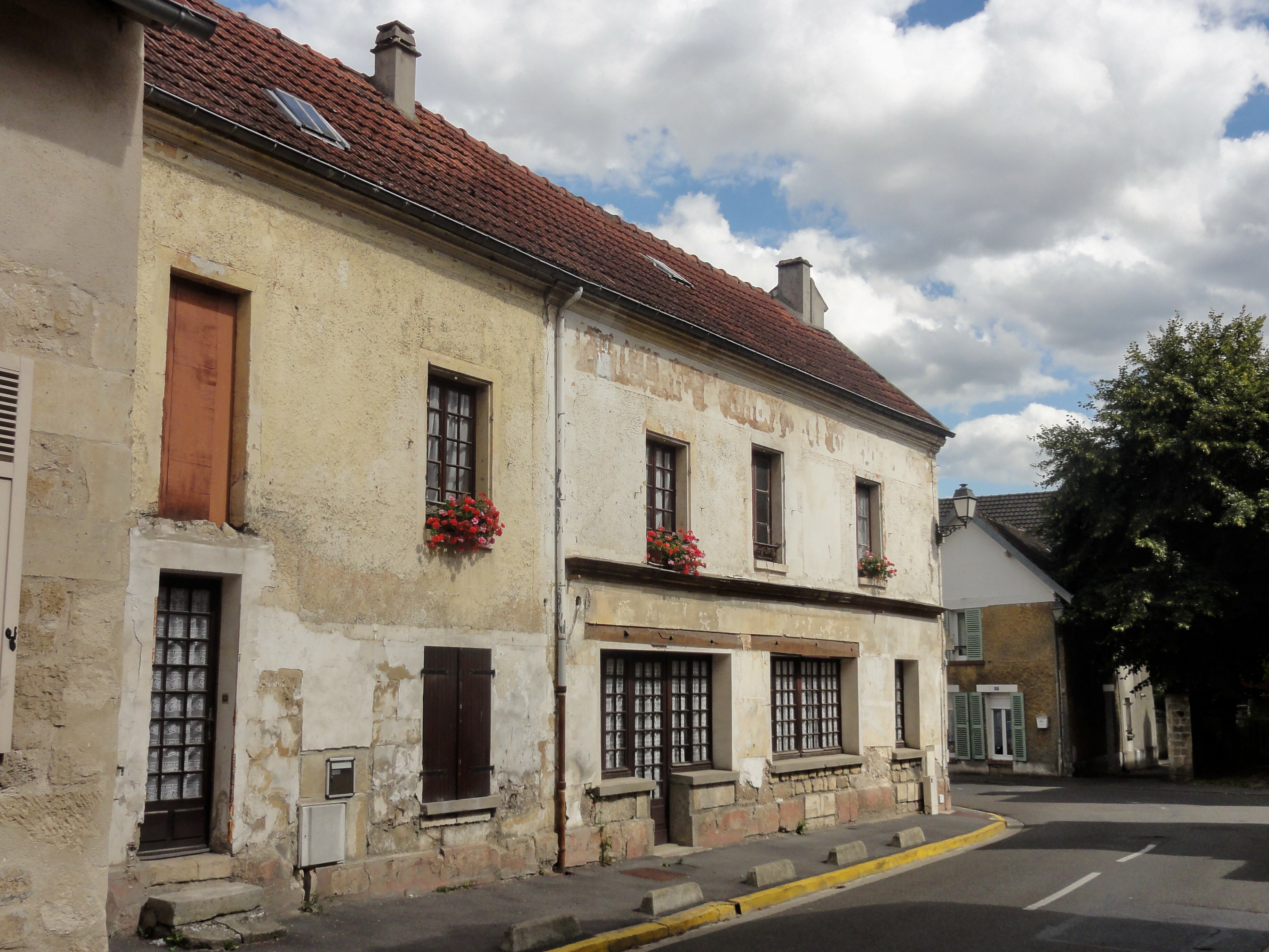 Ancienne auberge, Grande-rue.